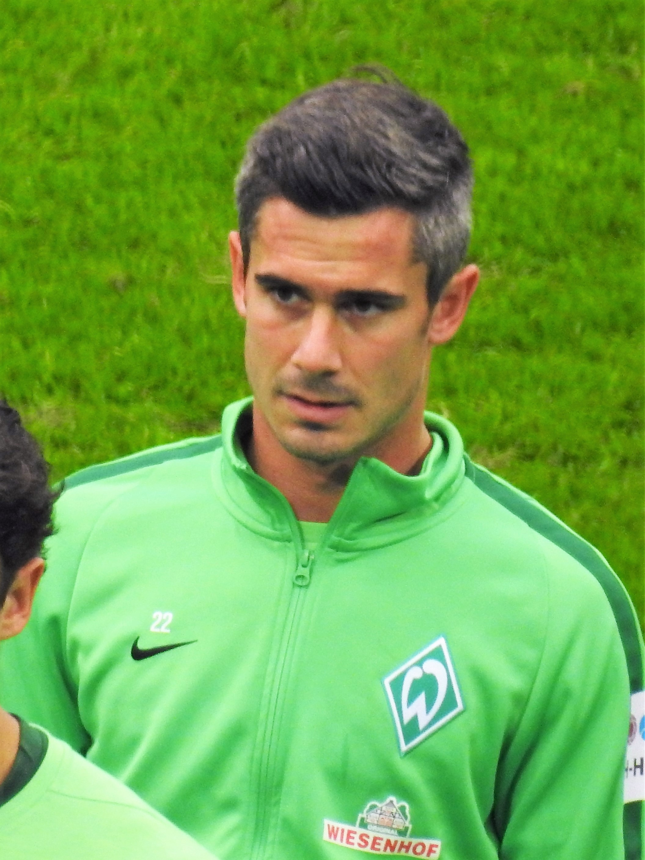 Fin Bartels als Spieler von Werder Bremen